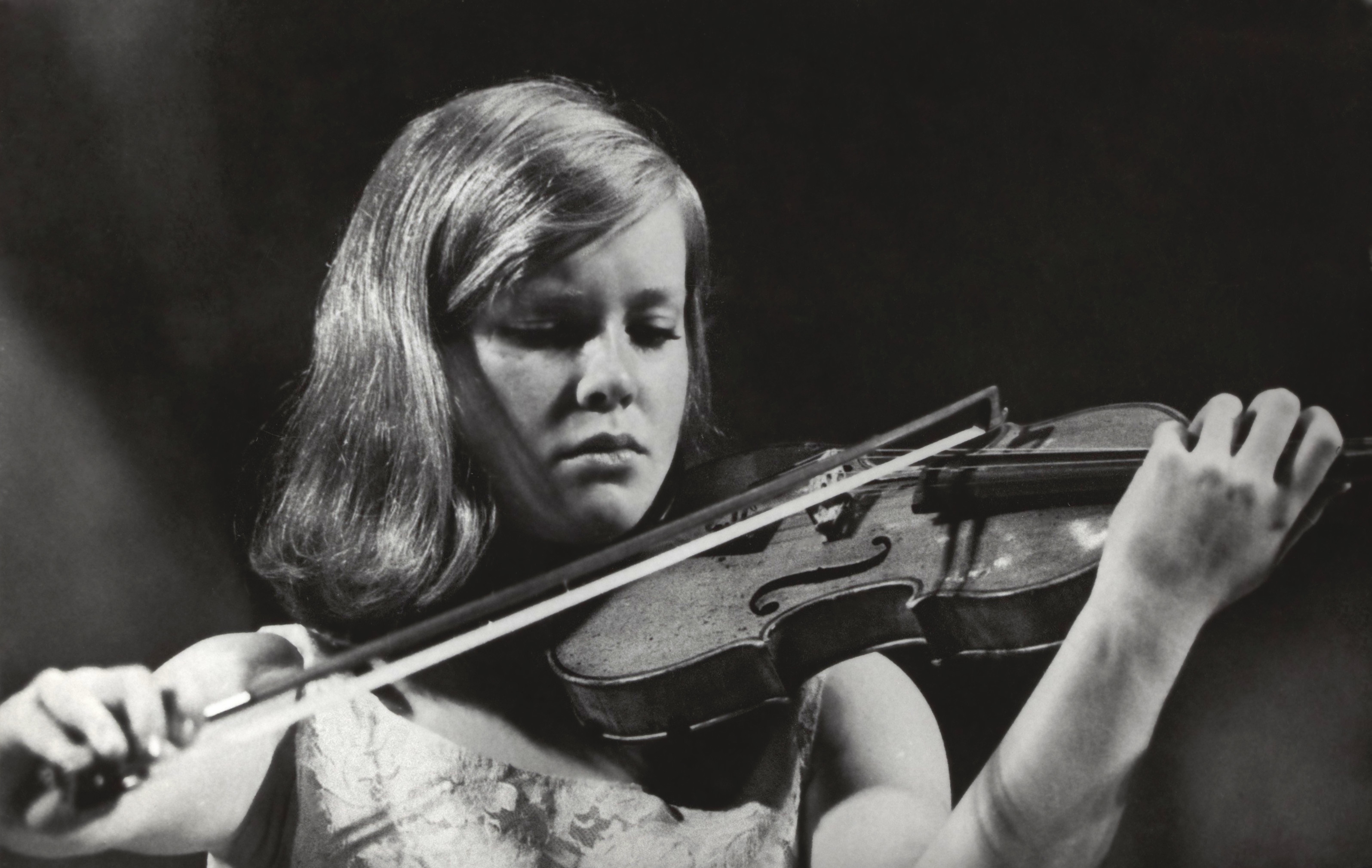 Collectie / Archief : Fotocollectie Elsevier Reportage / Serie : [ onbekend ] Beschrijving : musici, wedstrijden, violisten, verhey mw e, tschaikowsky concours Datum : 10 juni 1966 Locatie : Moskou, Rusland Trefwoorden : musici, violisten, wedstrijden Persoonsnaam : tschaikowsky concours, verhey mw e Fotograaf : Fotograaf Onbekend / Anefo Auteursrechthebbende : Nationaal Archief Materiaalsoort : Foto (zwart/wit) Nummer archiefinventaris : bekijk toegang 2.24.05.02 Bestanddeelnummer : 093-1212